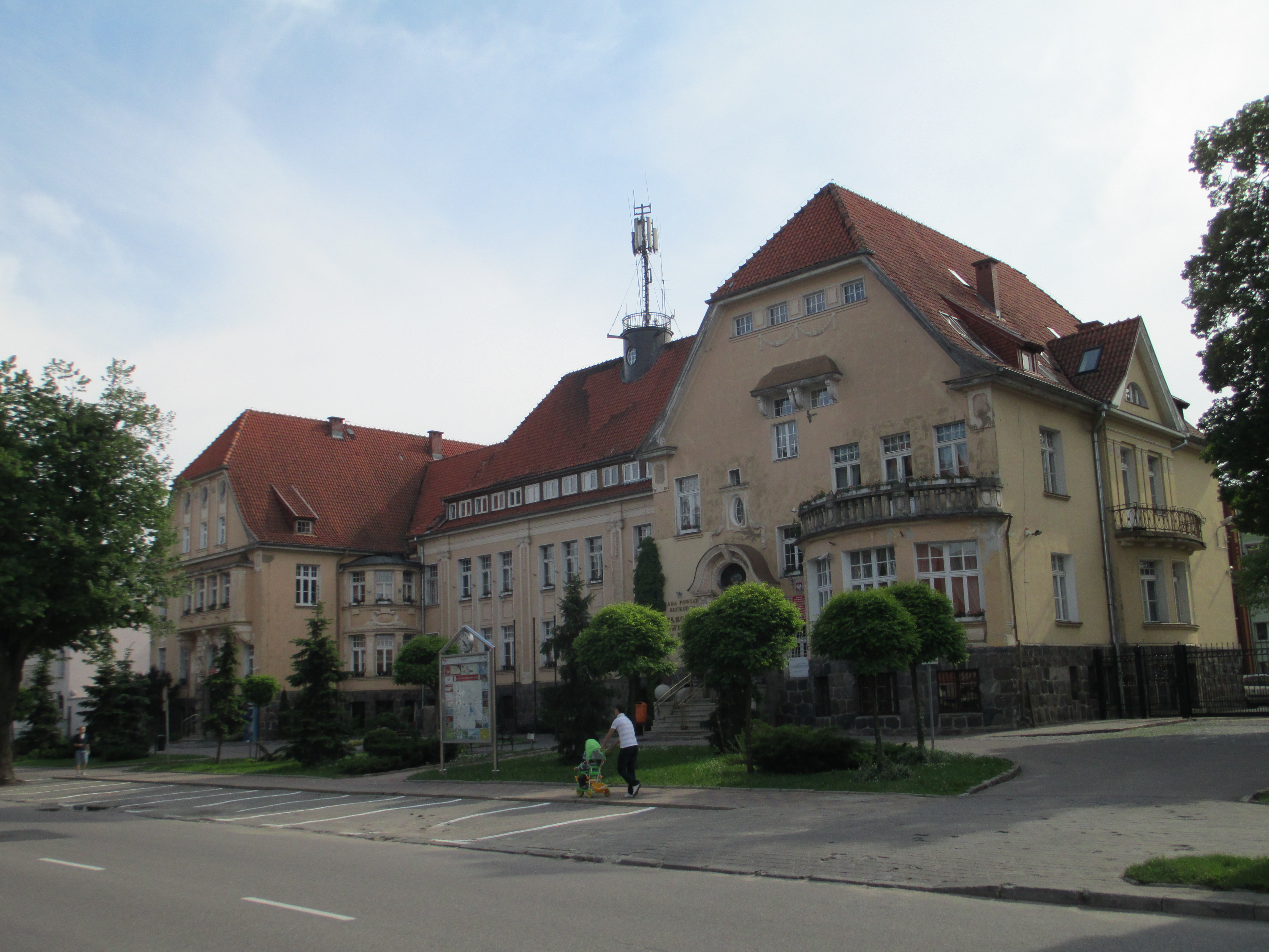 Ełk - Ratusz